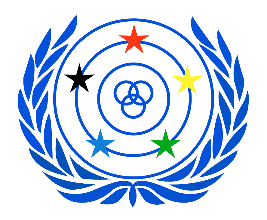 Le logo de la Fédération Mondiale des Sourds (World Federation of the Deaf)